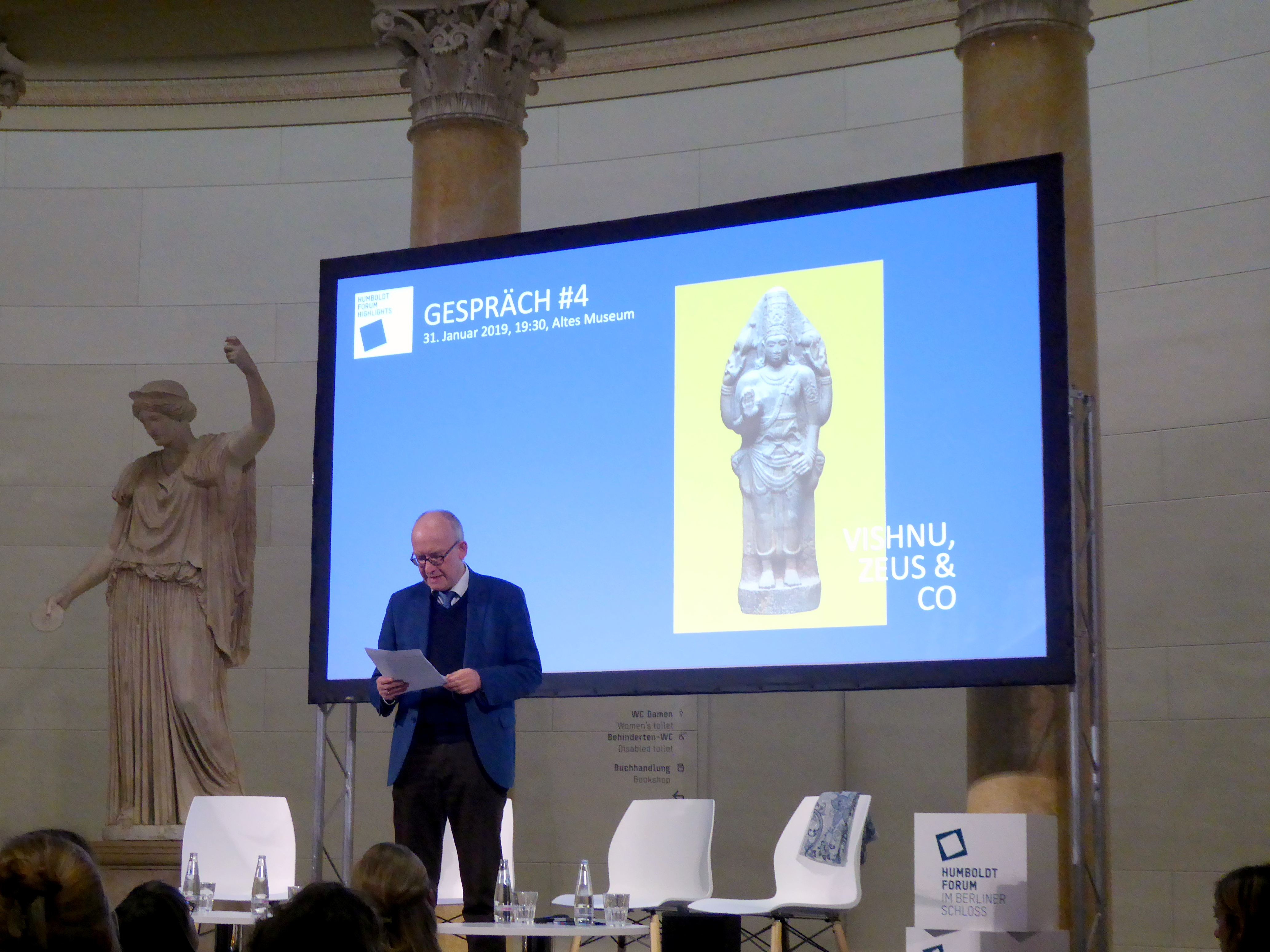 Der Direktor der Antikensammlung Prof. Dr. Andreas Scholl eröffnet die Veranstaltung zu den Highlights des Humbold Forums